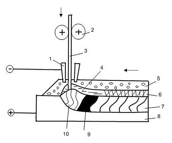 Сварка под флюсом